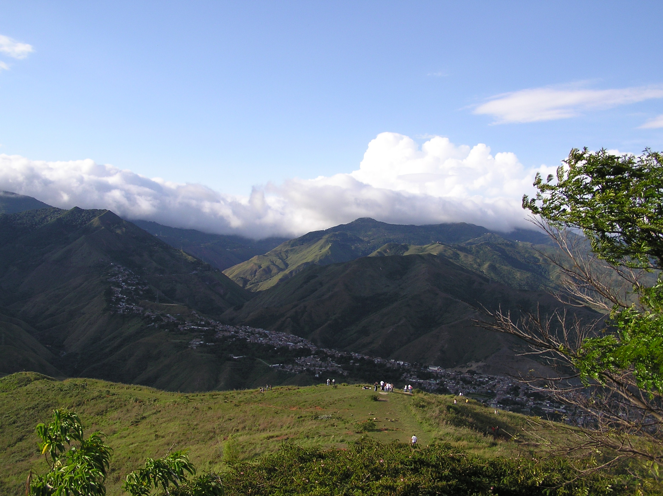 Comuna 1, Cali, Colombia